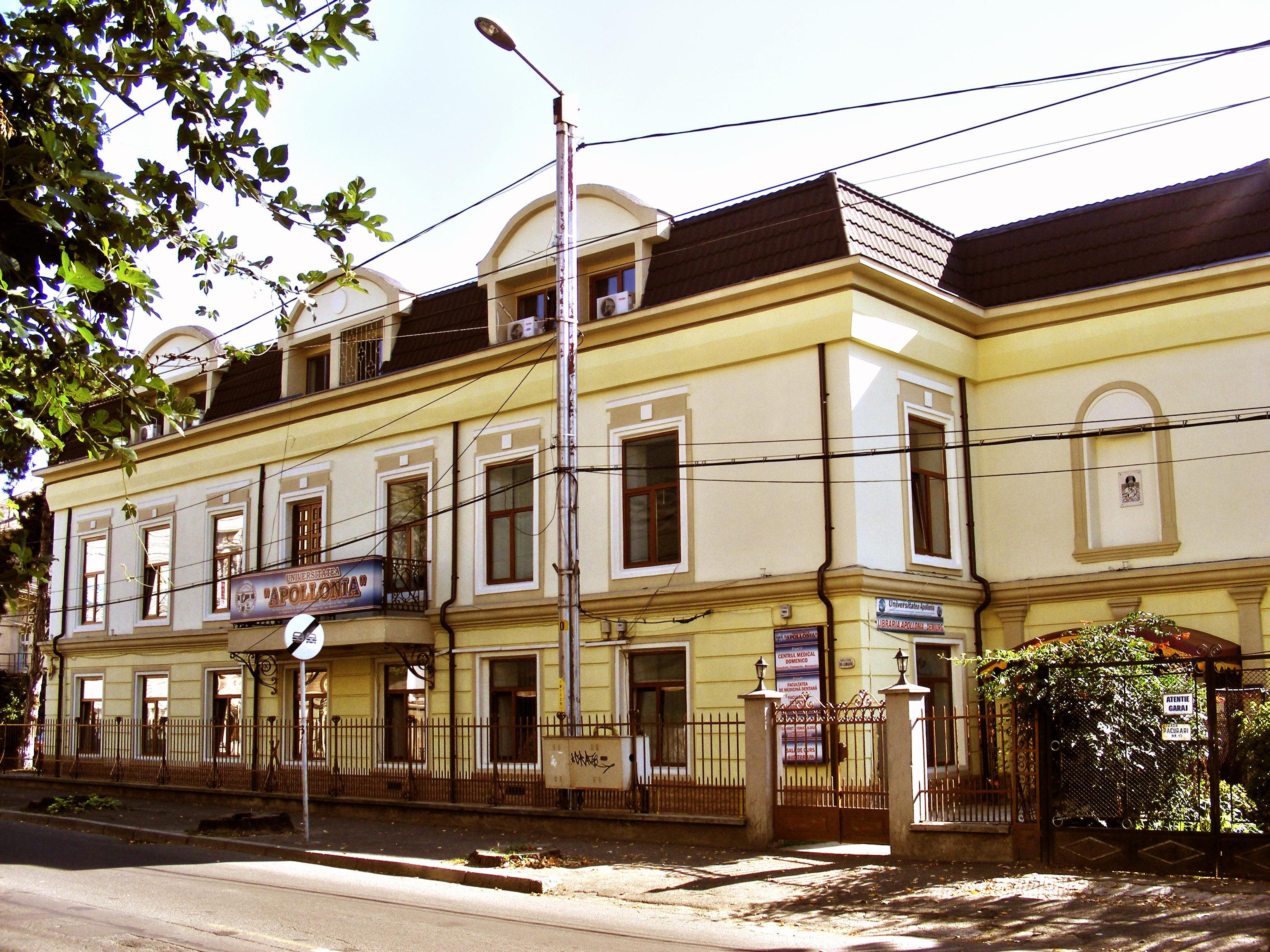 Casa Beldiman-Penescu, azi Universitatea Apollonia